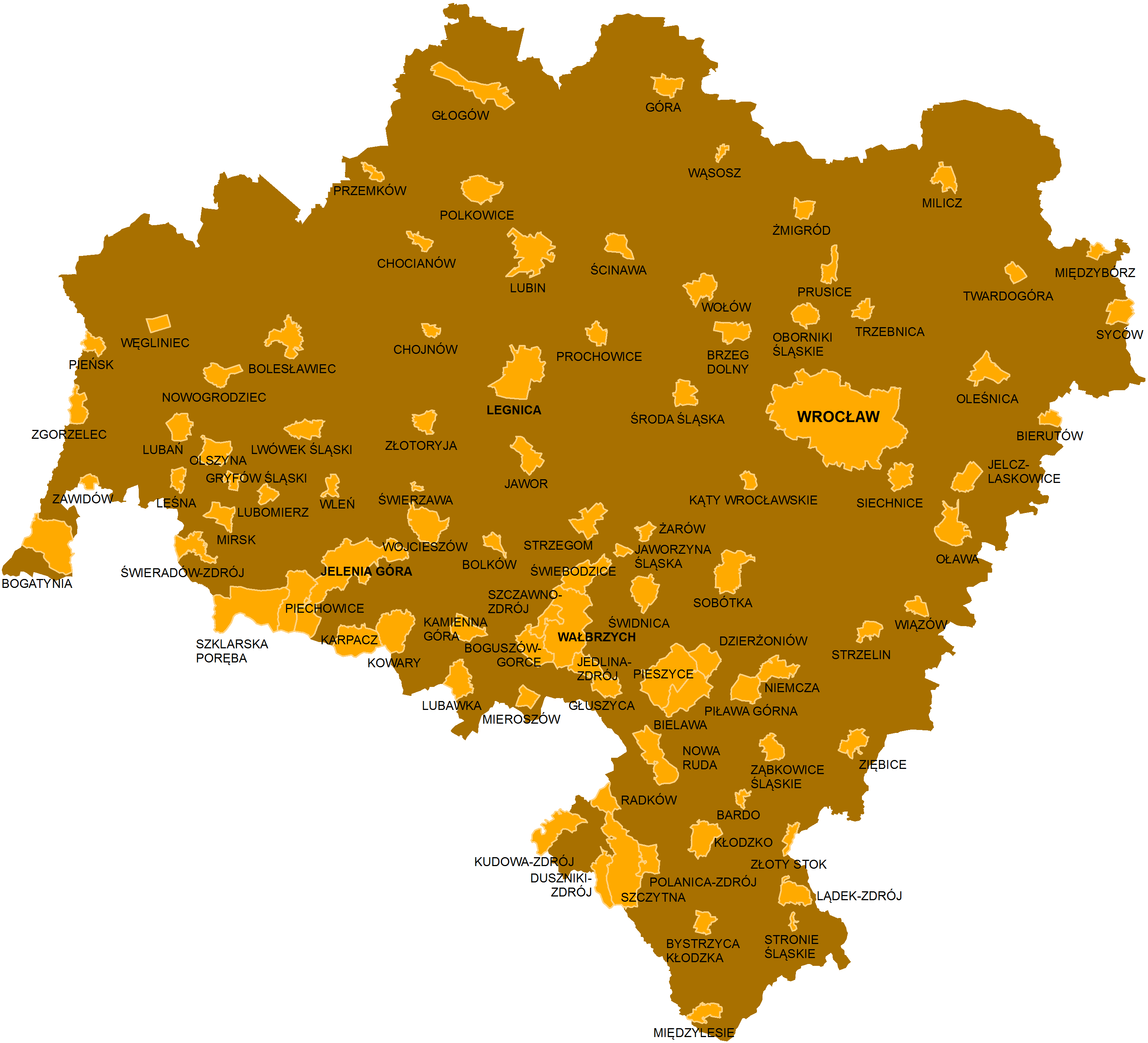 Miasta województwa dolnośląskiego (stan na 03.06.2013)